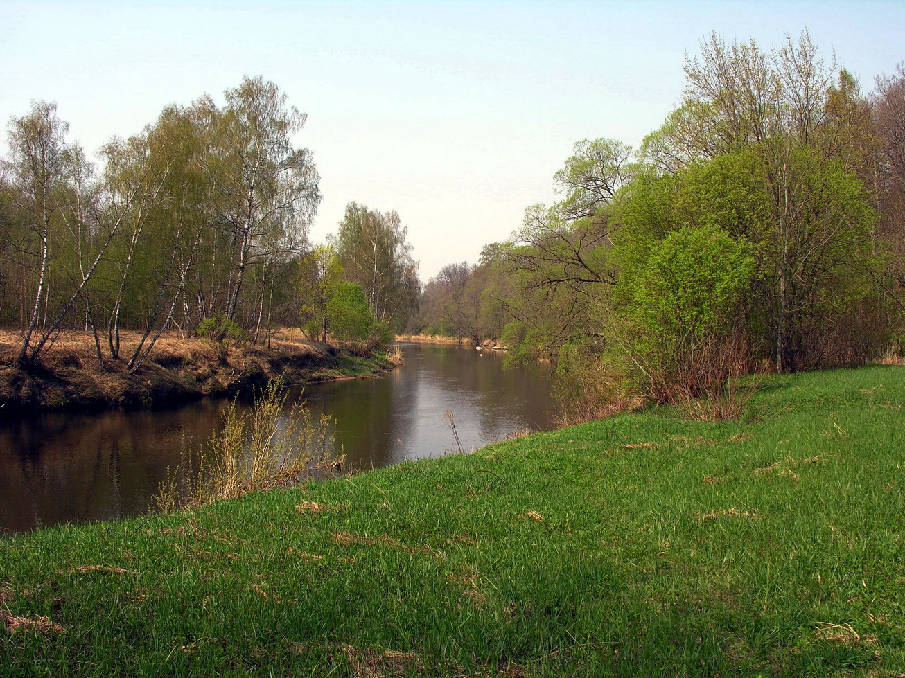 Žemaitėška: bat-smg:Pavasaris Puortegrapėjė: Algėrda, 2006 m. gegužies 6 d., bat-smg:Žemaitėjė